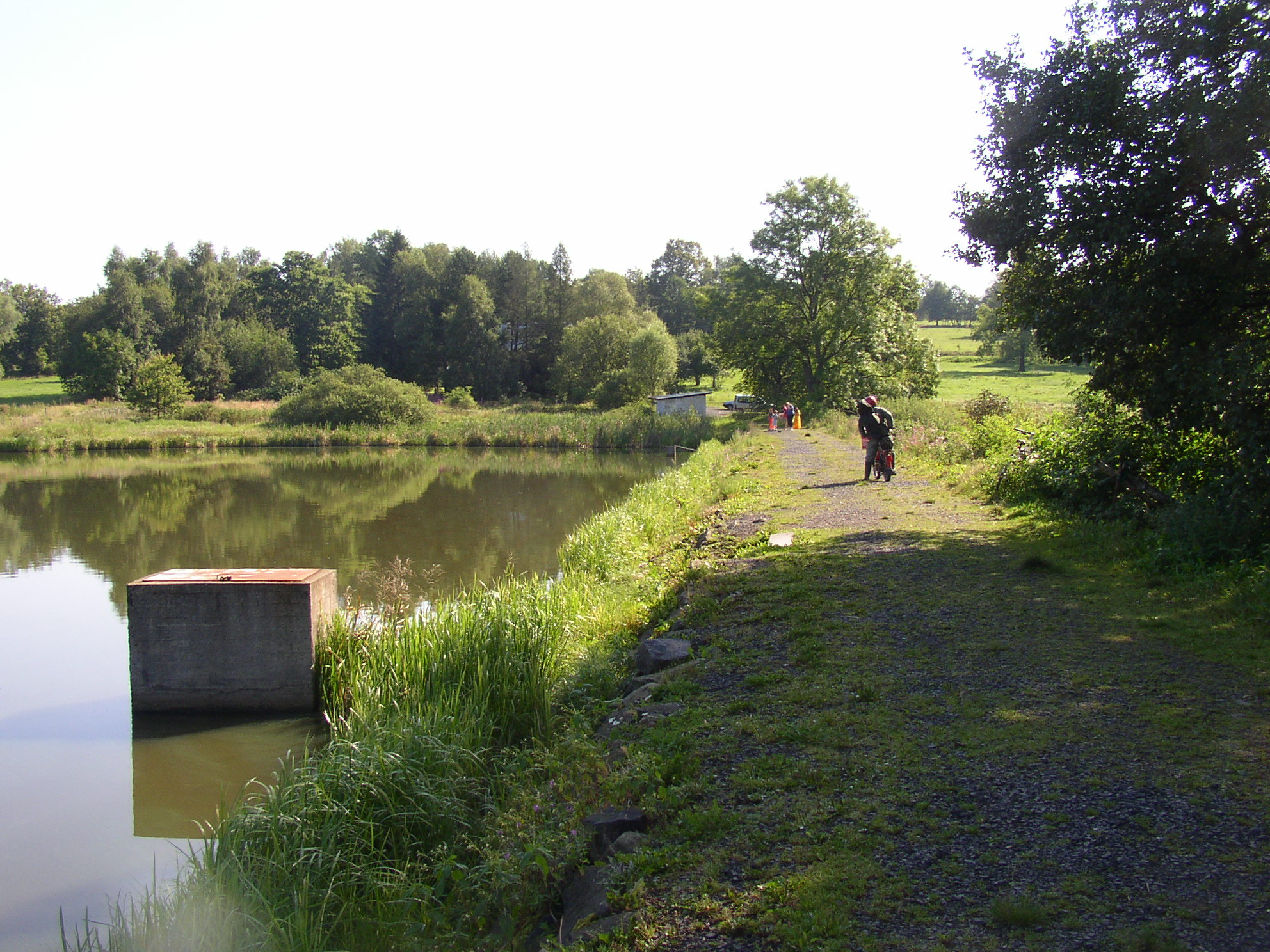 Hráz rybníka Světlík, obec Horní Podluží, okres Děčín